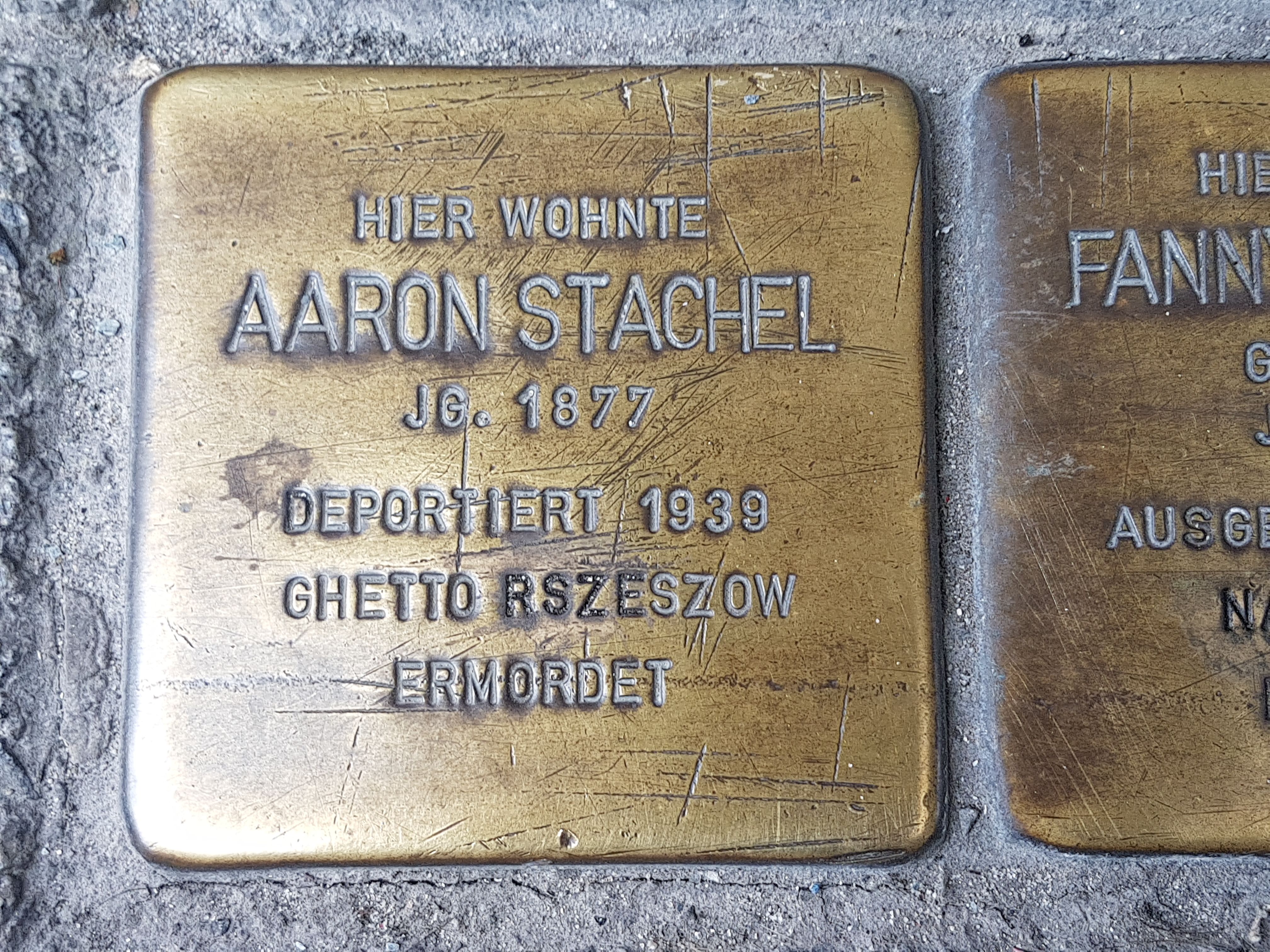 Aaron Stachel Stolpersteine Duisburg